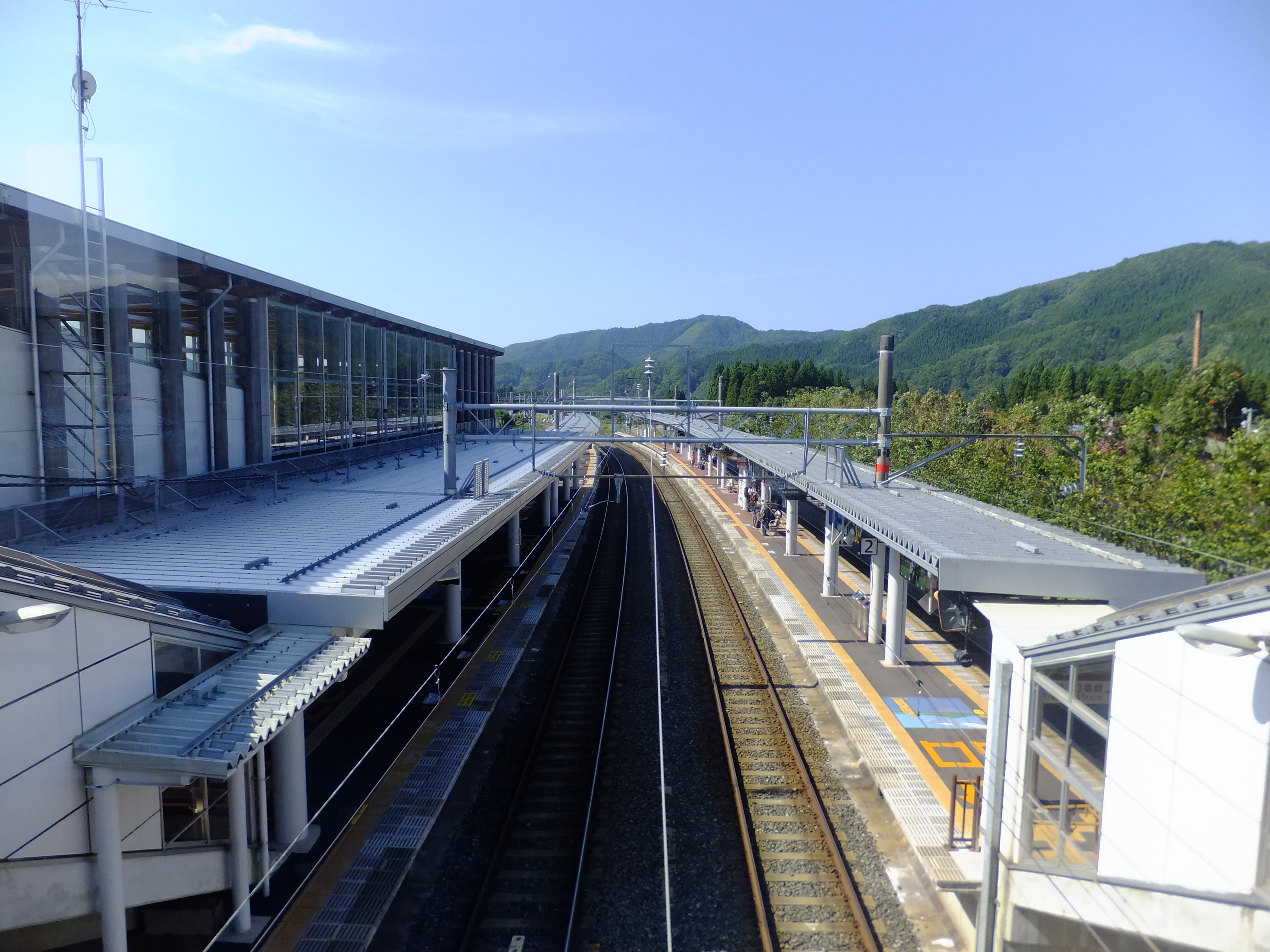 構内跨線橋から見た田沢湖駅ホーム